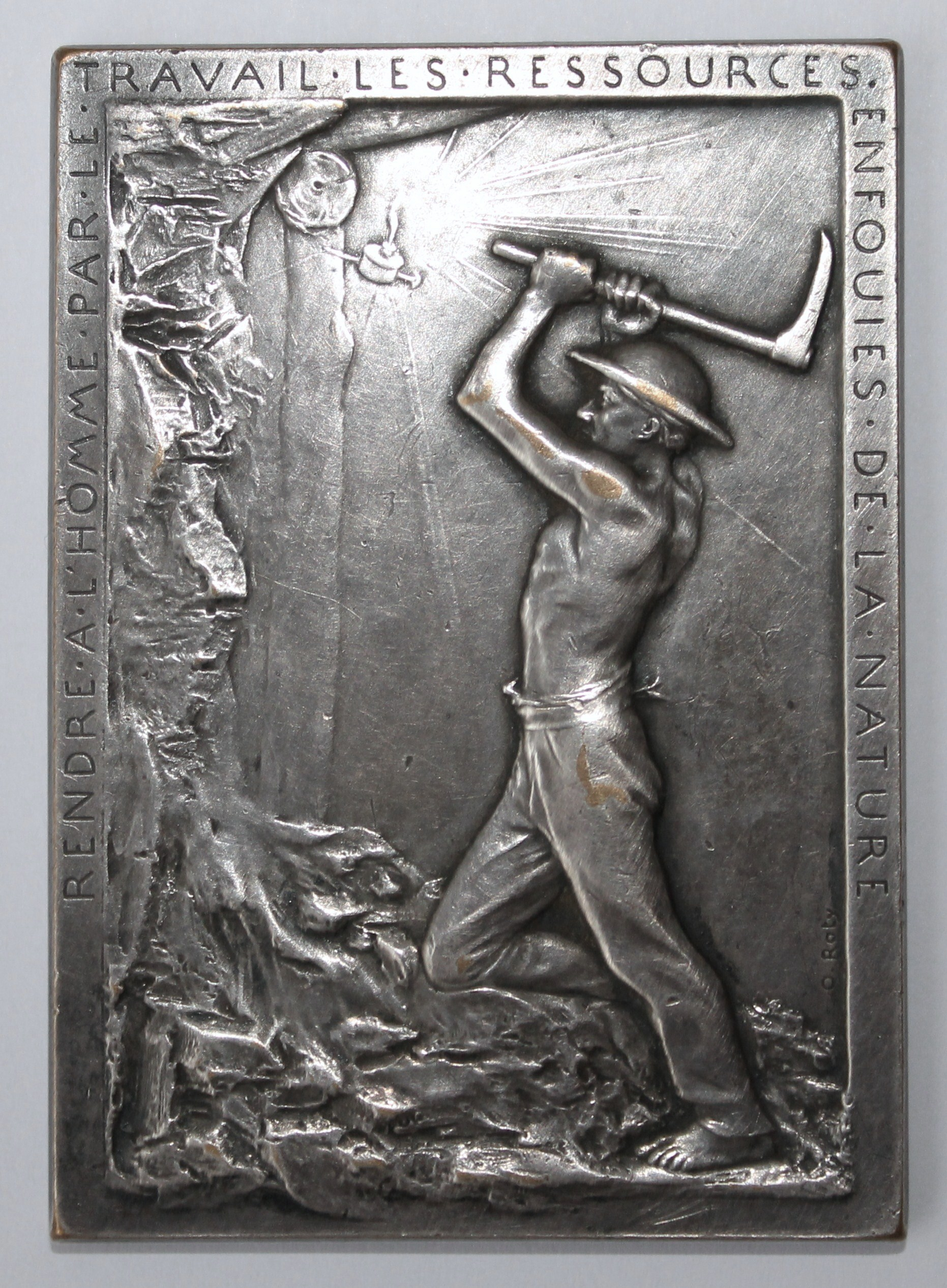 Médaille des Mines de Lens 1899 gravée par Oscar Roty, RENDRE A L'HOMME PAR LE TRAVAIL LES RESSOURCES ENFOUIES DE LA NATURE